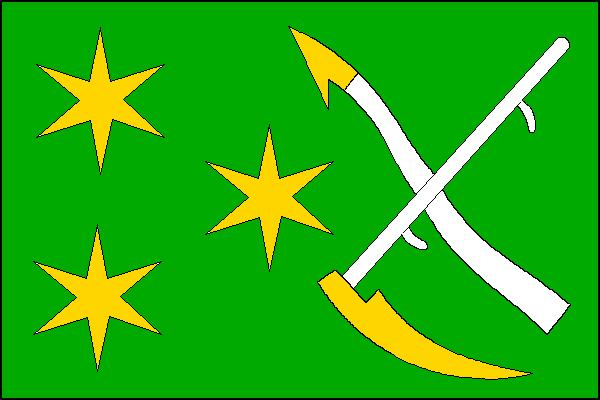 Česky: vlajka obce Újezd